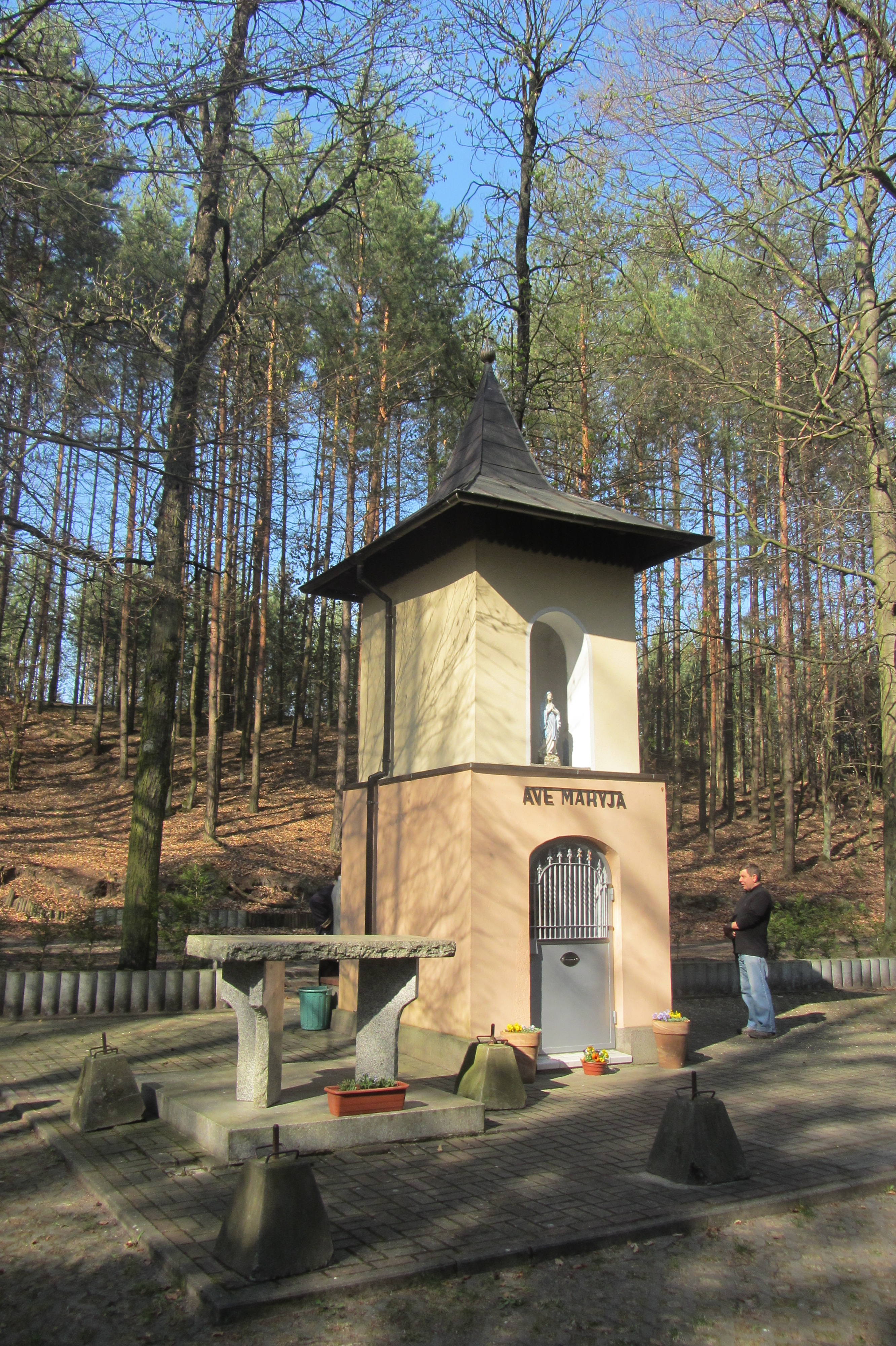 Heilquelle mit der Kapelle Studzionka